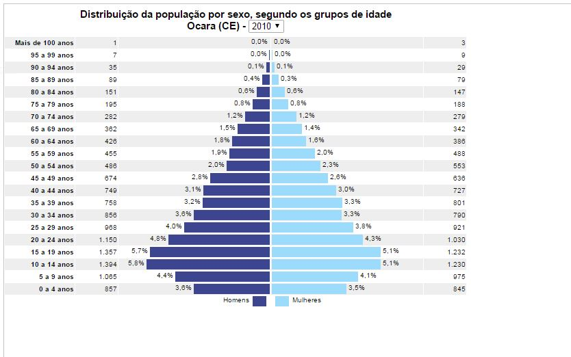 Faixa etária do municipio de Ocara